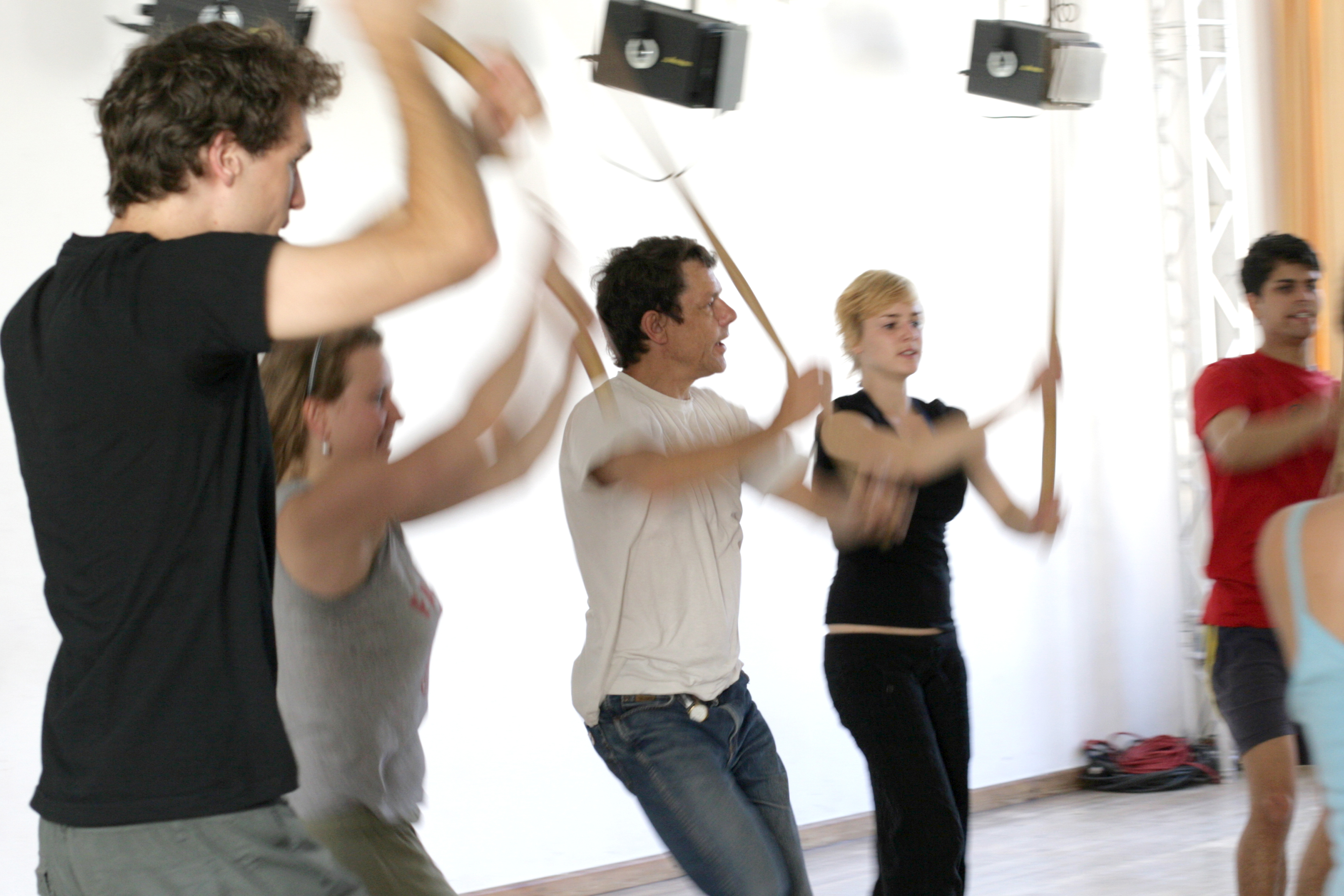 Stocktraining Michael Tschechow Studio Berlin - Foto: Charlotte Fischer